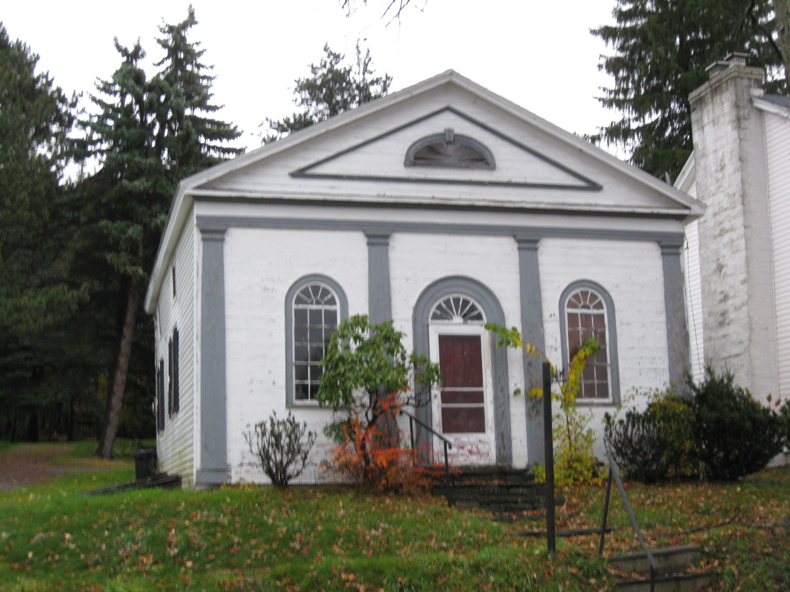 Waverly, Pennsylvania